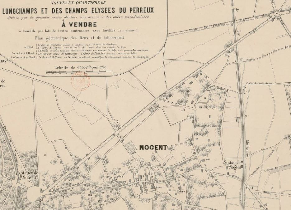 Route de Paris à Lagny.Nogent sur Marne.XIXe siecle.Nouveaux quartiers